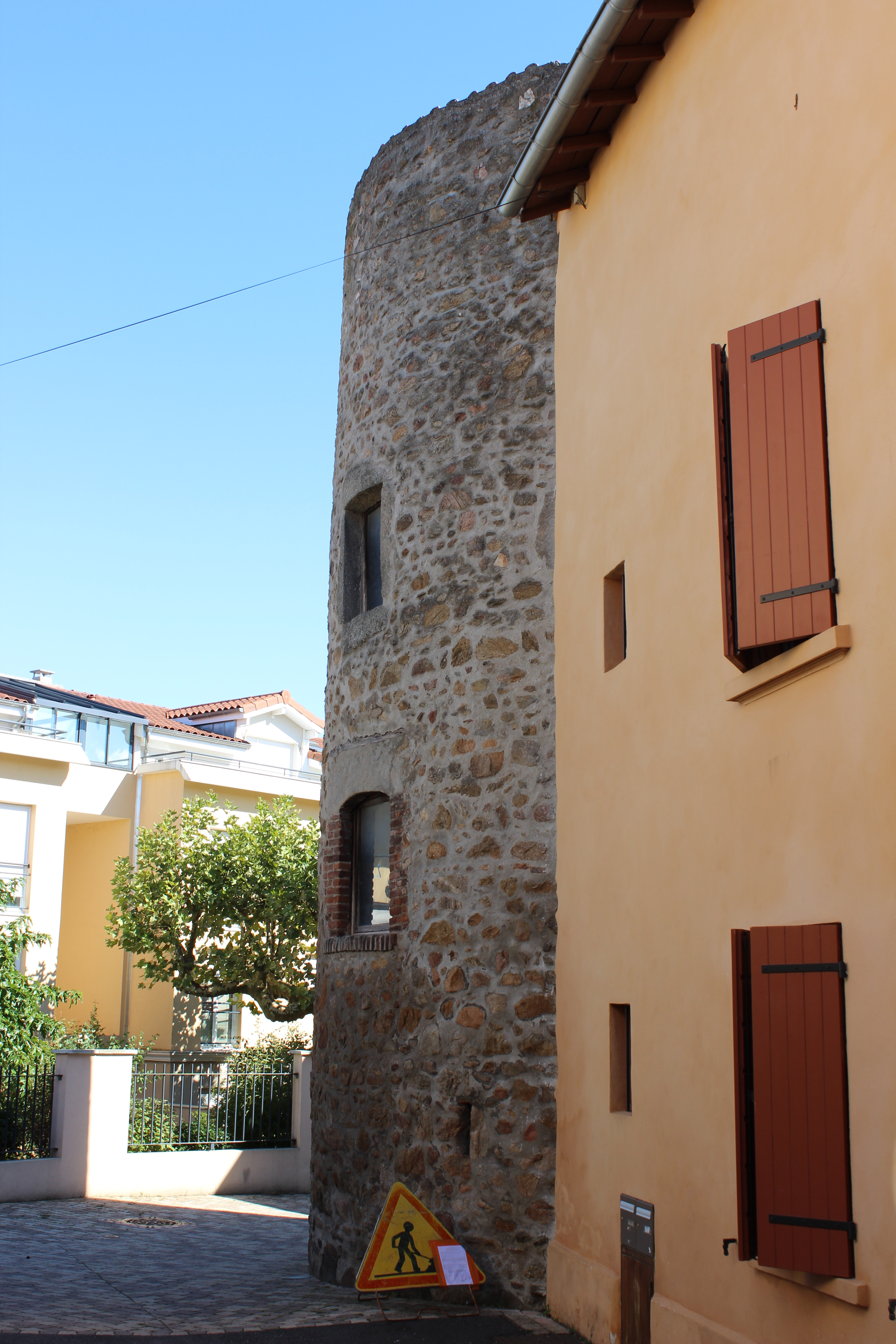 Tour ronde à Grézieu-la-Varenne.